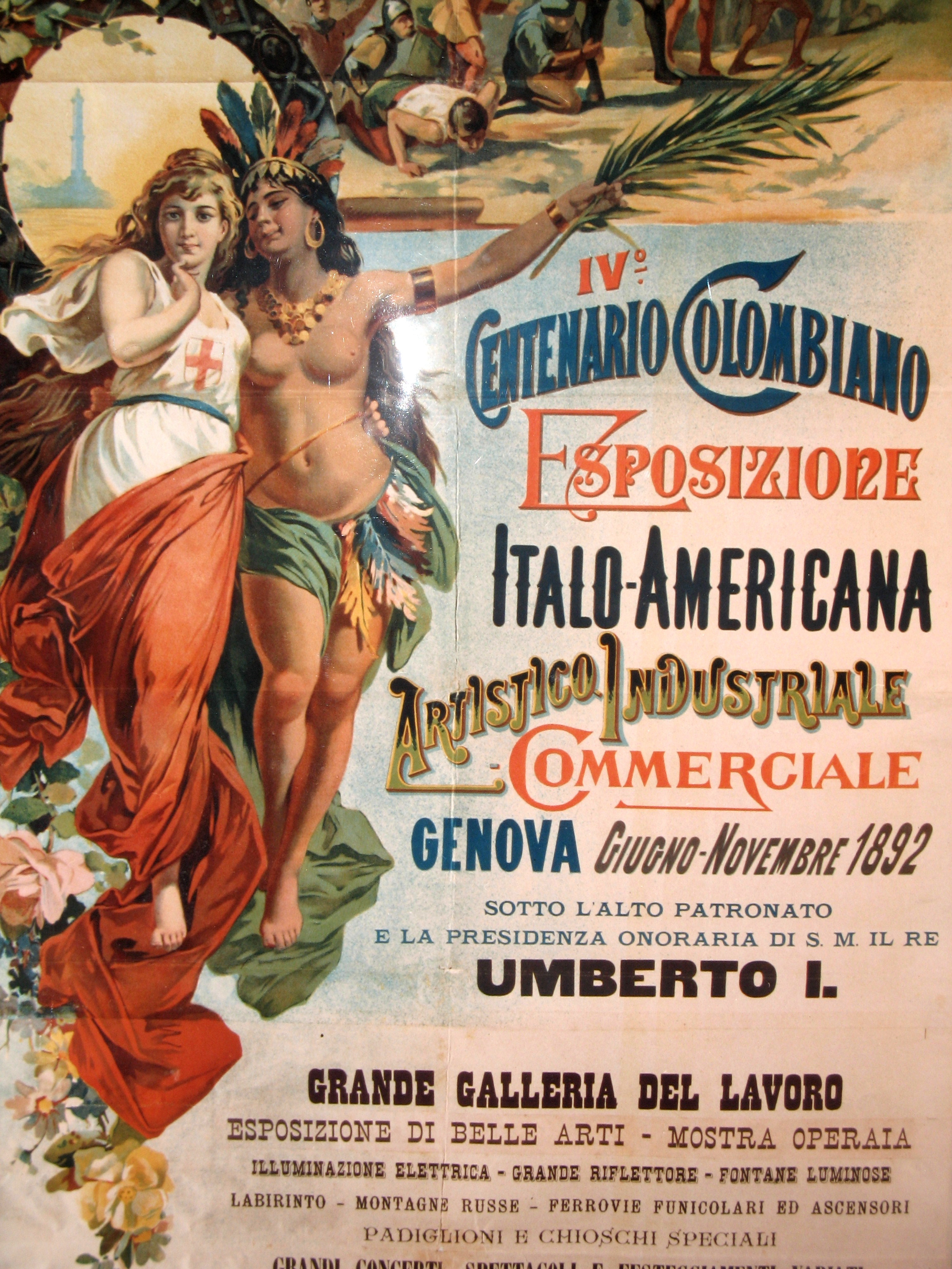 Immagine da Genova, Italia. - Manifesto per l'Esposizione Italo-Americana del 1892 in occasione del quattrocentenario della scoperta dell'America.